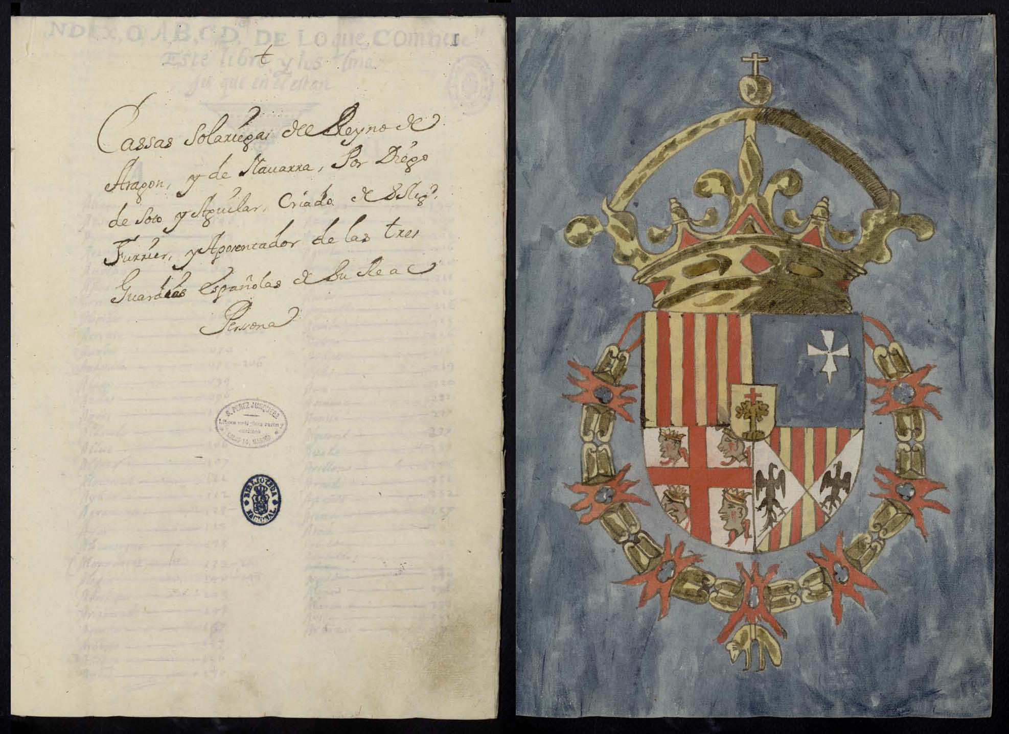 Diego de Soto y Aguilar Casas Solariegas del Reino de Aragón y Navarra MS3130 de la Biblioteca Nacional de Madrid. Composición de sendas páginas 4 (izda) y 11 (dcha)